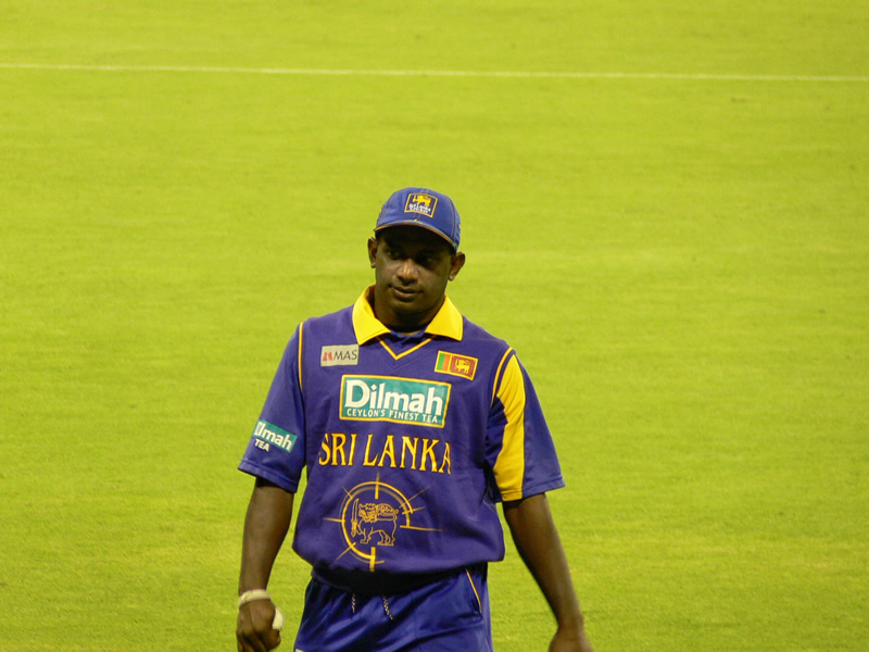 Sri Lankan cricketer Sanath Jayasuriya.